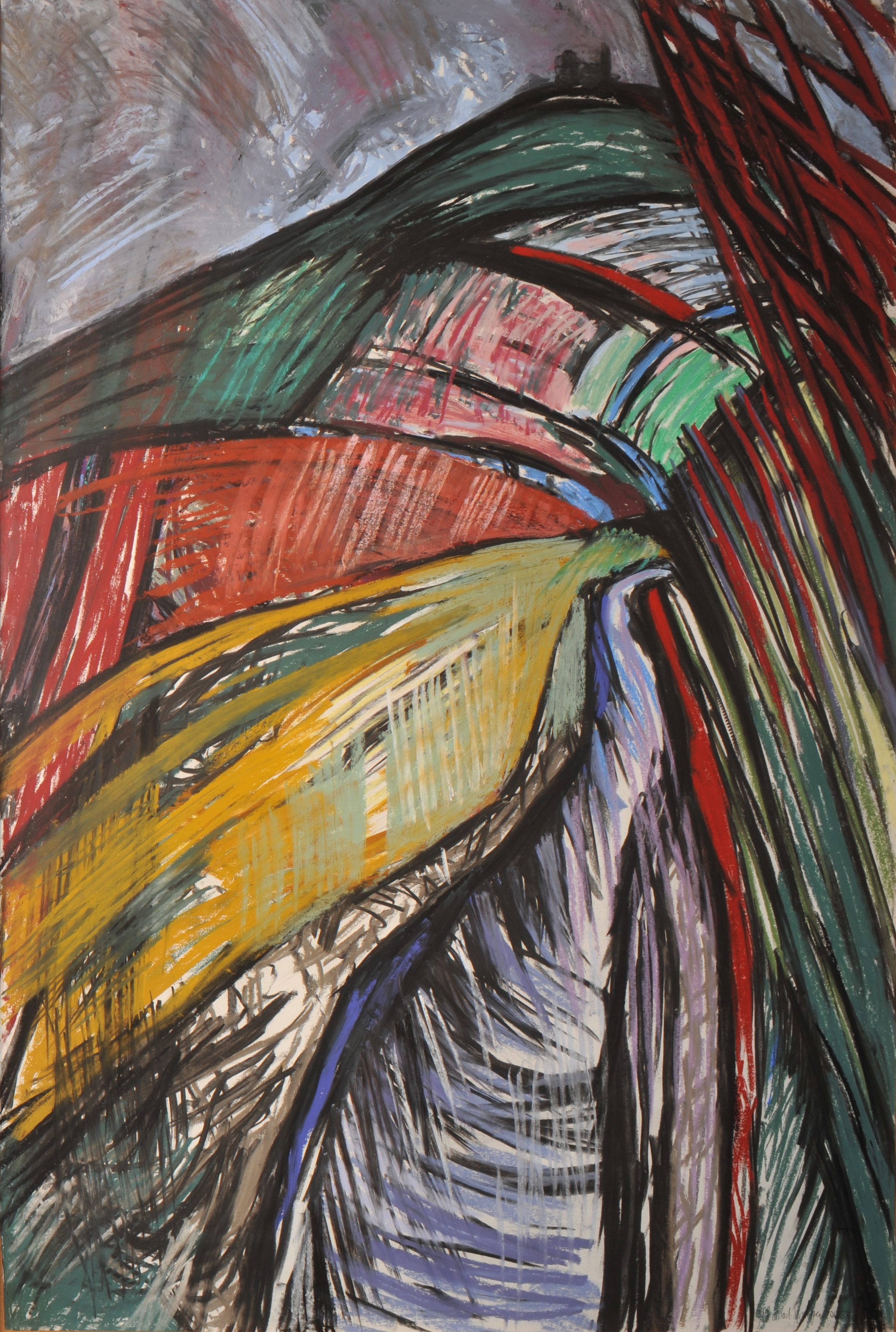 Oeuvre au pastel de l'artiste française Claude Stassart-Springer